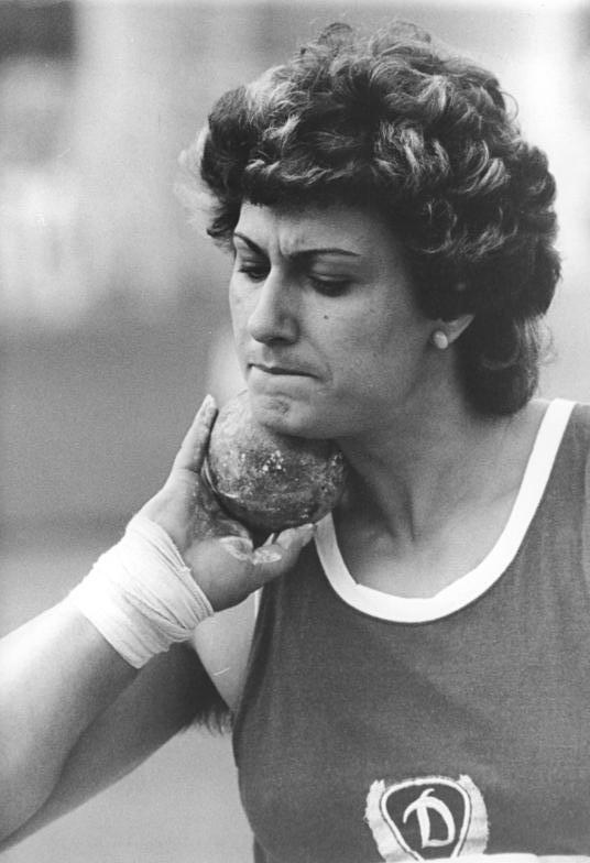 Heike Hartwig ADN-ZB Koard 24.8.87-A-Potsdam: 38. DDR-Leichtathletik-Meisterschaften-Heike Hartwig, SC Dynamo Berlin, siegte am 22.8. im Kugelstoßen mit einer Weite von 21,11 Metern.